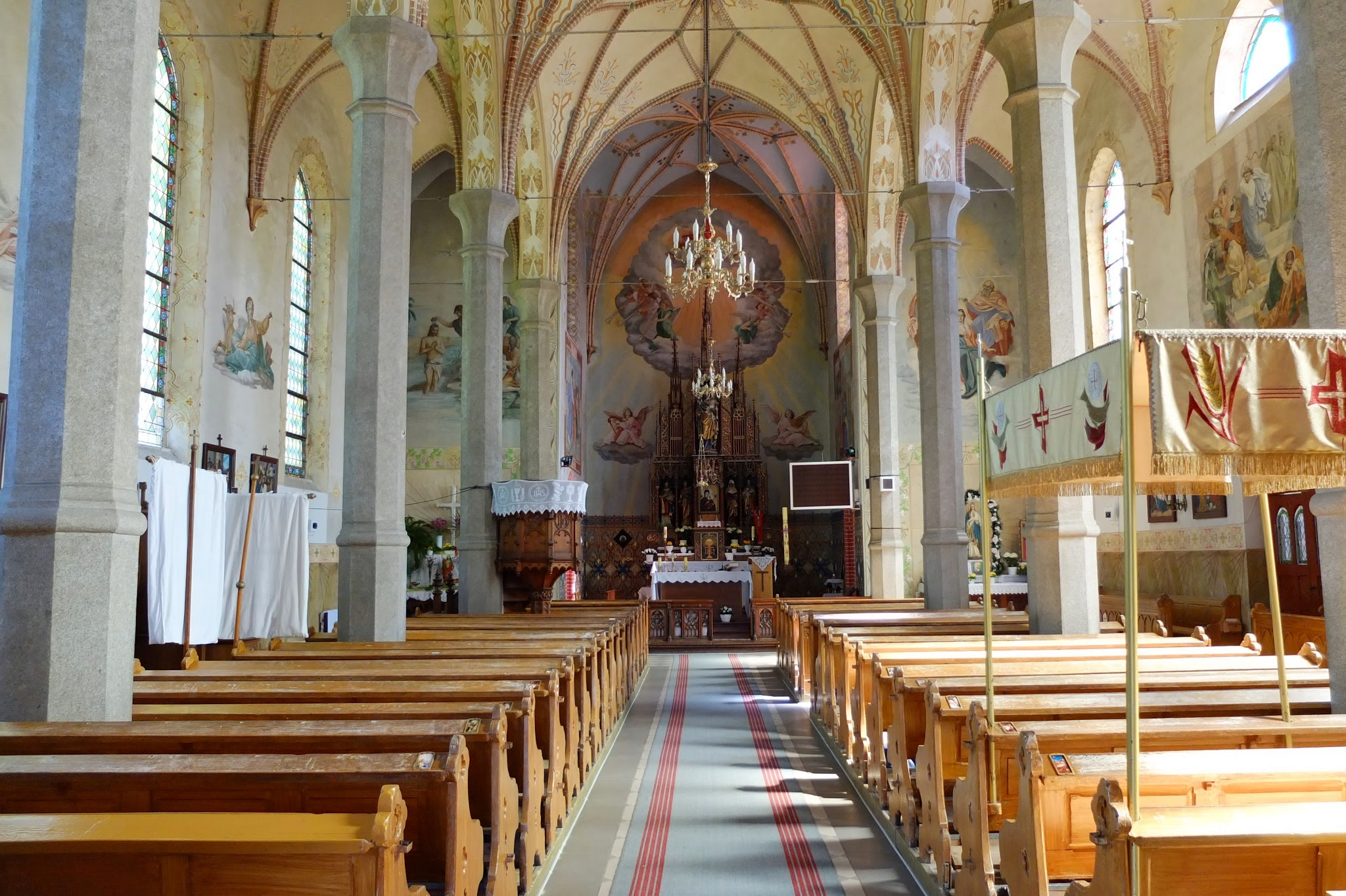 Kościół świętego Józefa